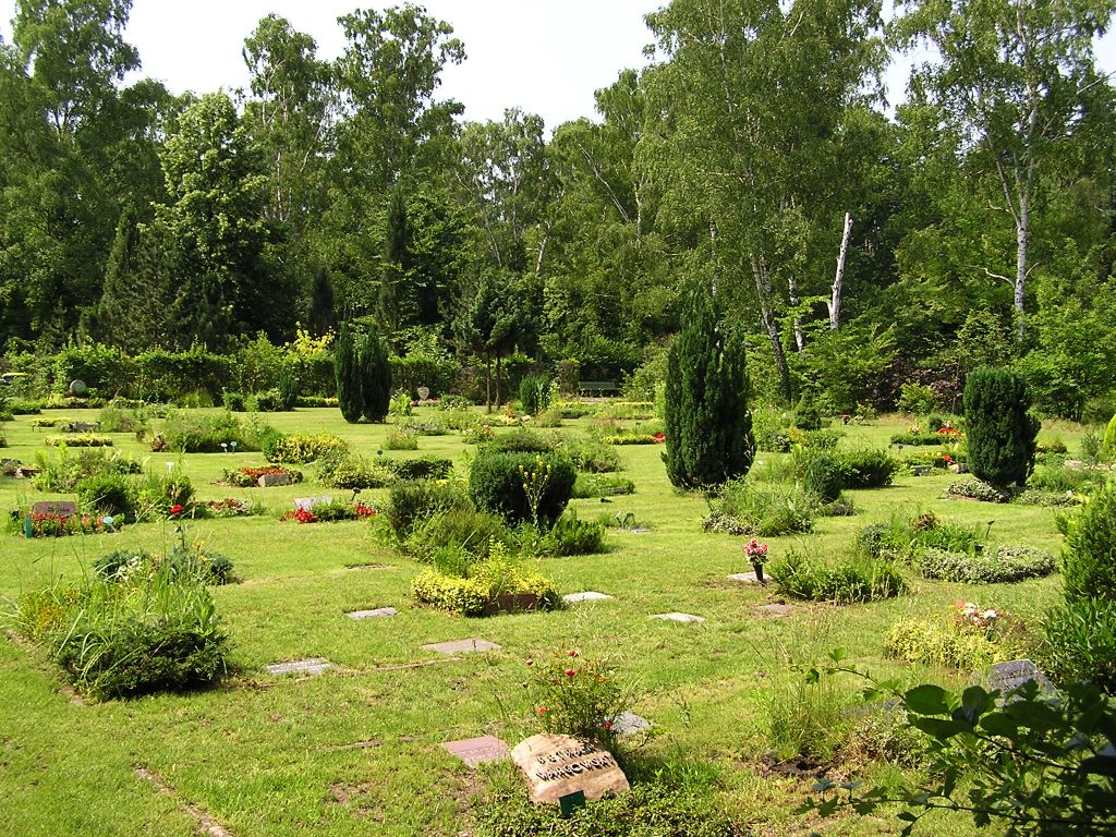 Blick über ein Urnengrabfeld auf dem Friedhof Ruhleben in Berlin